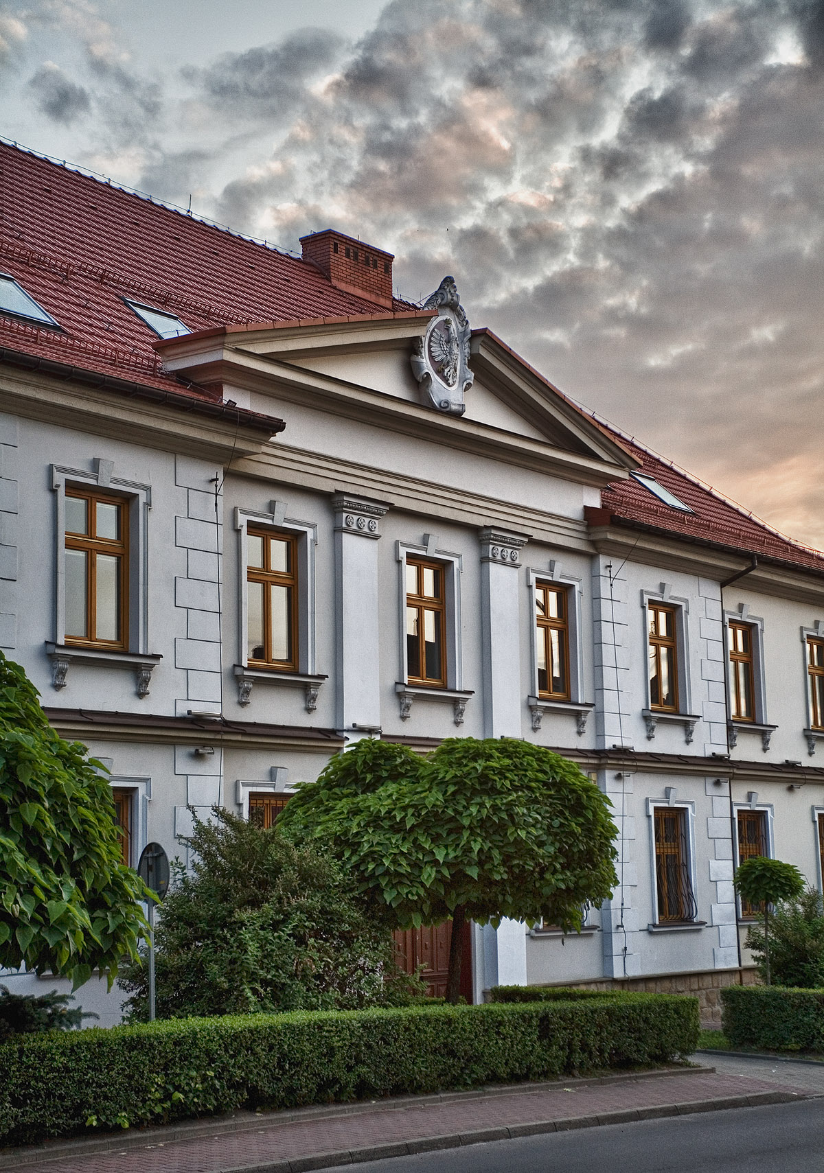 Bochnia - gmach Sądu Rejonowego